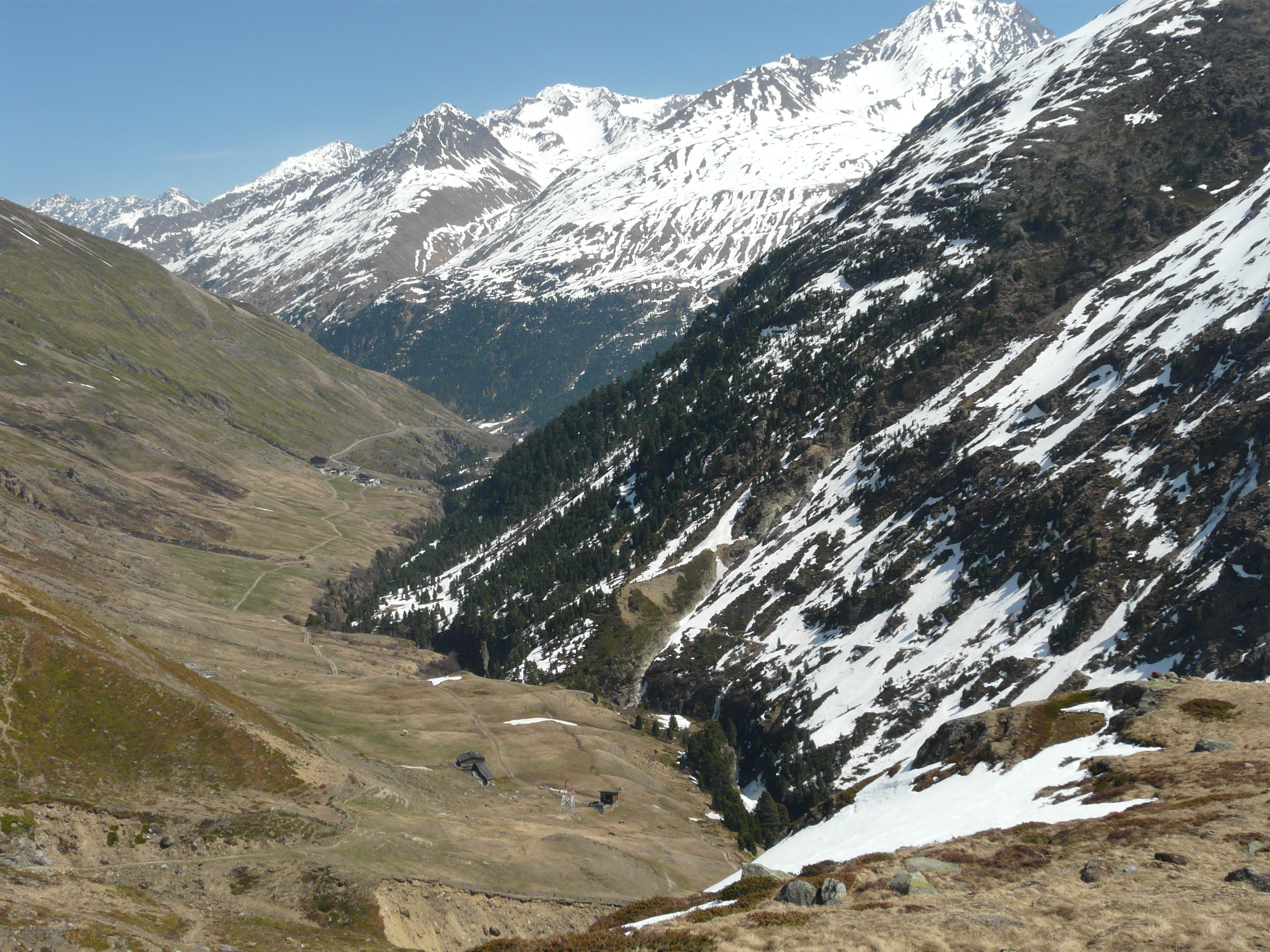 Das Rofental in den Ötztaler Alpen